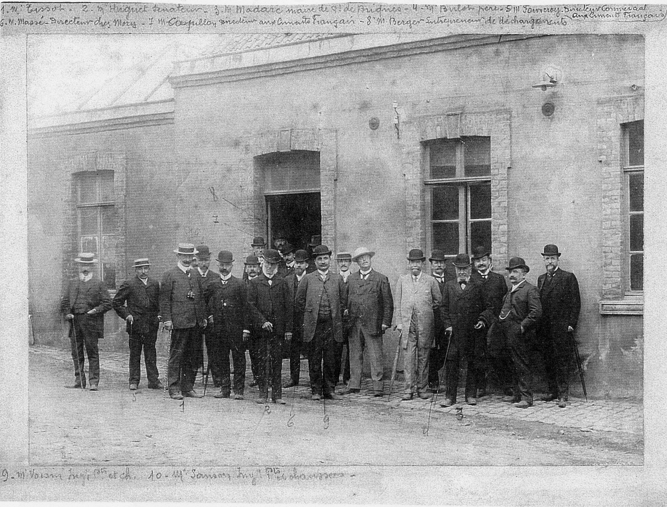 Les personnalités invitées à la mise à feu du haut fourneau déménagé de Marseille (1906)